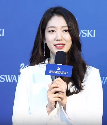 12월 10일 오후 3시 서울 영등포 타임스퀘어 아트리움 중앙광장에서 ‘박신혜 X 스와로브스키와 함께 준비하는 미리 크리스마스 포토월’이 있었다. 박신혜는 오스트리아 크리스털 패션 주얼리 브랜드 스와로브스키의 오너먼트로 크리스마스 트리를장식하고 선물 박스를 포장하는 등 다양한 프로그램을 통해 팬들과 소통하는 시간을 가졌다.